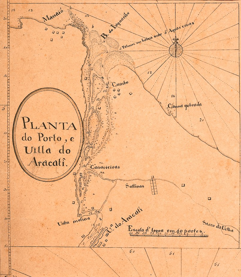 Detalhe da 'Carta da Capitania do Ceará' desenhada por António José da Silva Paulet em 1813. A planta de Aracati mostra a pequena vila, com uma rua edificada dos dois lados e traçado retilíneo, uma praça, a igreja e umas poucas edificações. A vila incluía-se em uma série de núcleos, fundados no século XVIII, na Capitania do Ceará, com traçado regular.